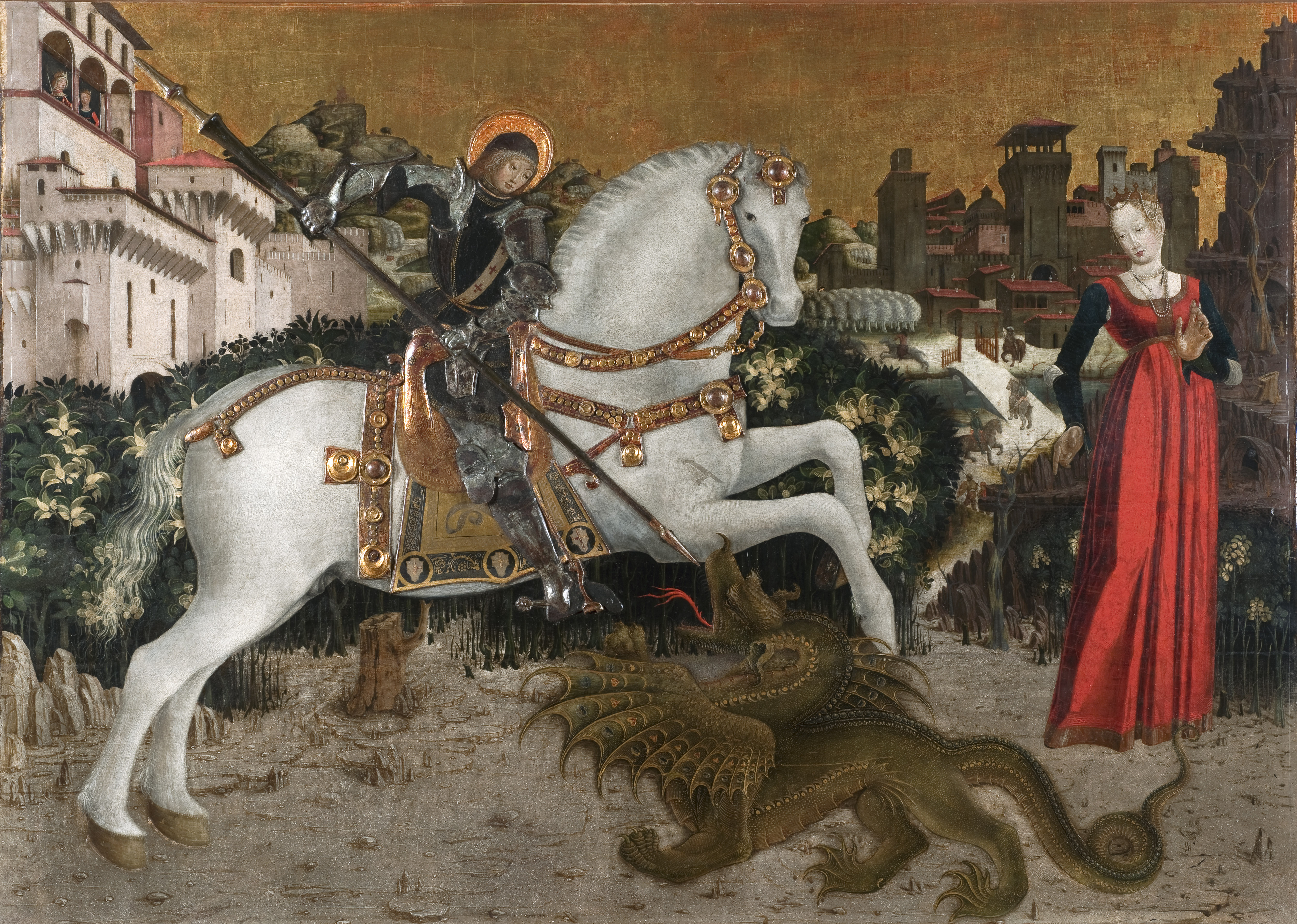 San Giorgio e la principessa.Saint George and the princesstitle QS:P1476,it:"San Giorgio e la principessa." label QS:Lit,"San Giorgio e la principessa."